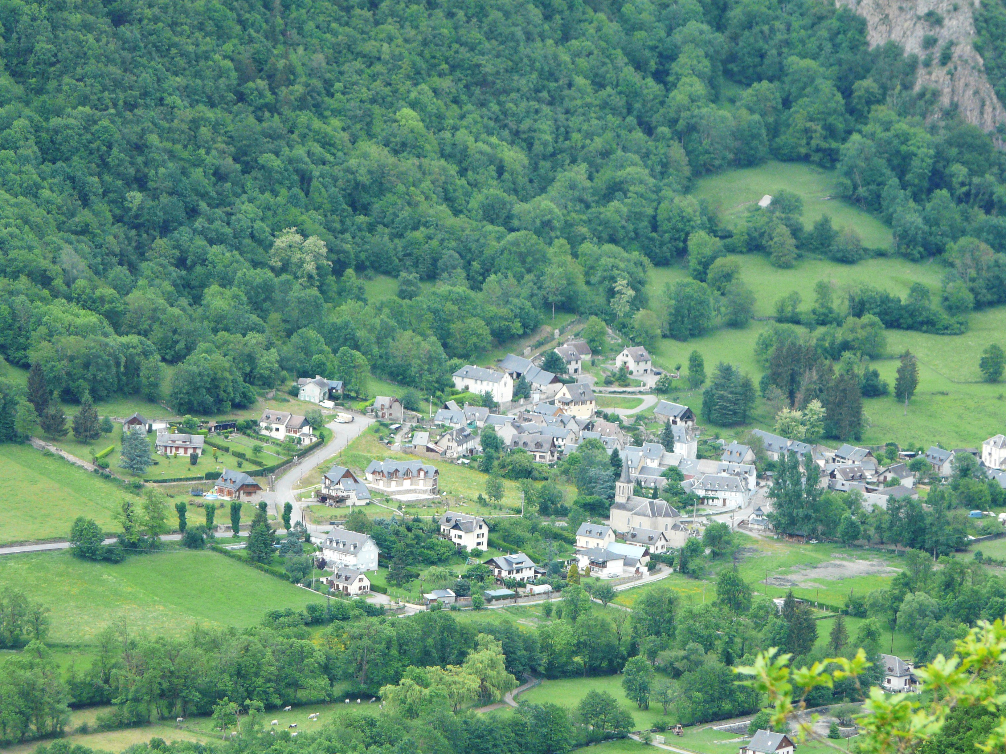 Le village d'Antignac, Haute-Garonne, France.